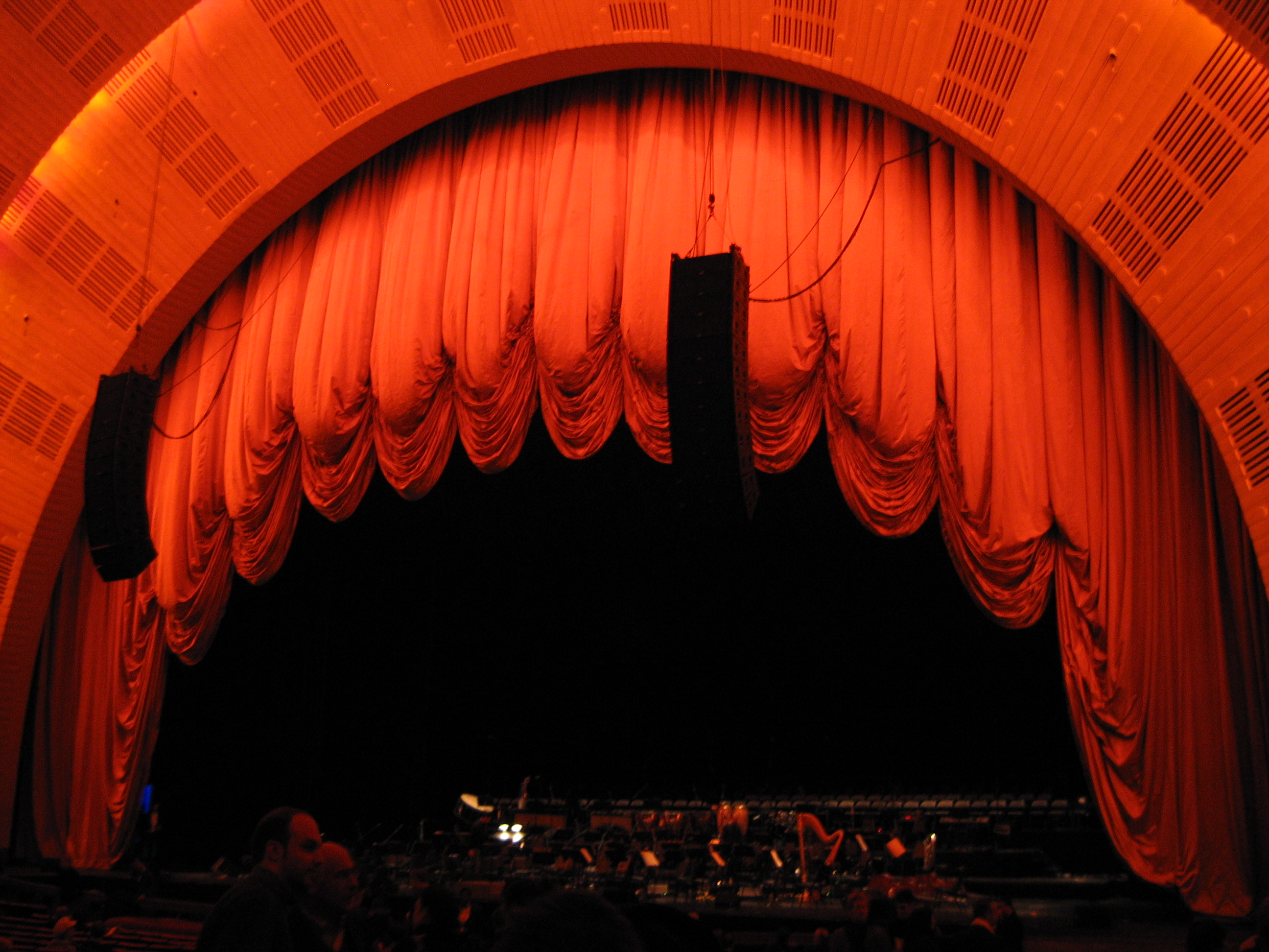 El telón del escenario principal del Radio City Music Hall. Nueva York, Estados Unidos, 3 de febrero de 2007.